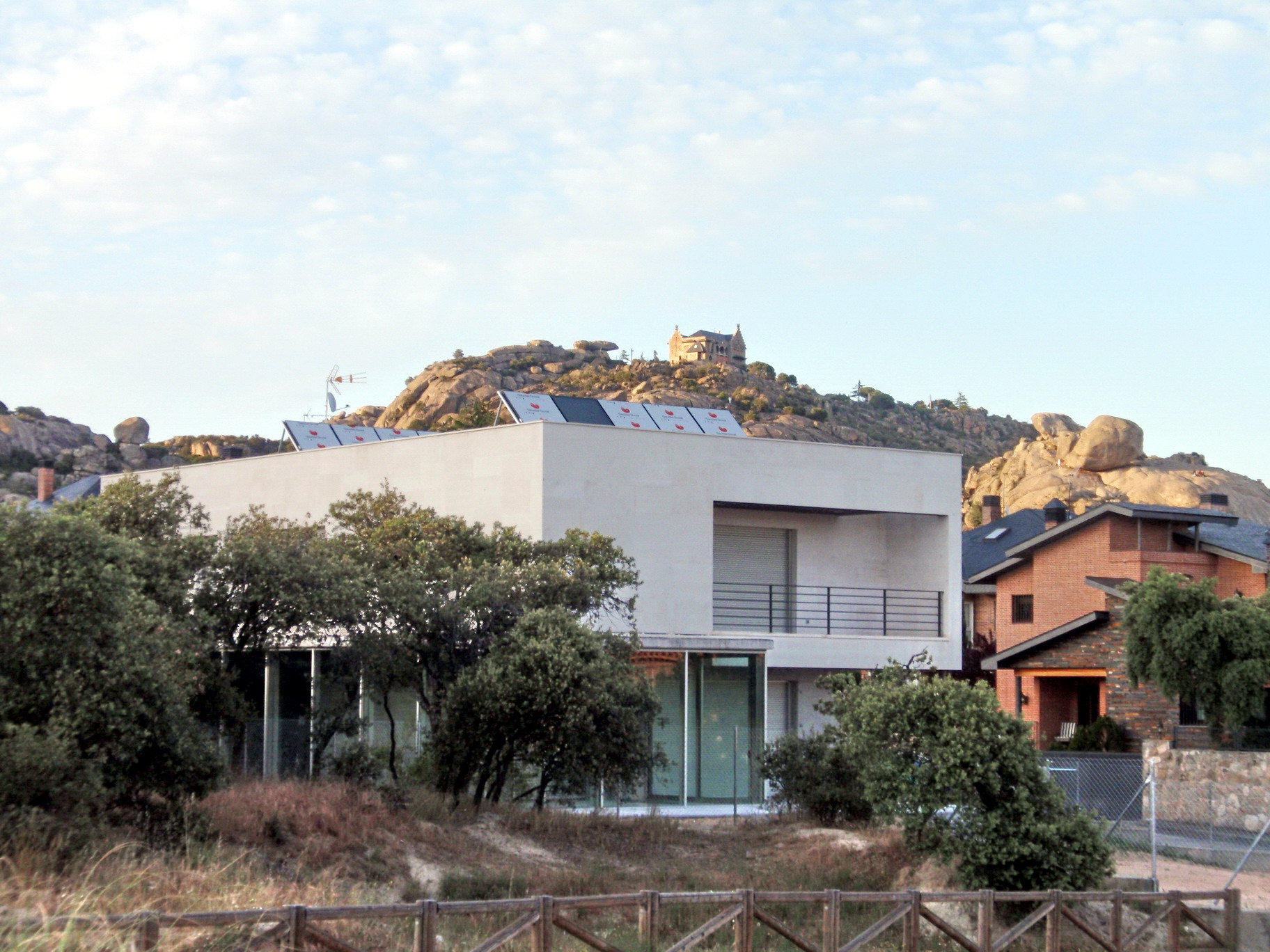 Torrelodones. Urbanización Los Robles. Chalet bajo el Palacio del Canto del Pico.